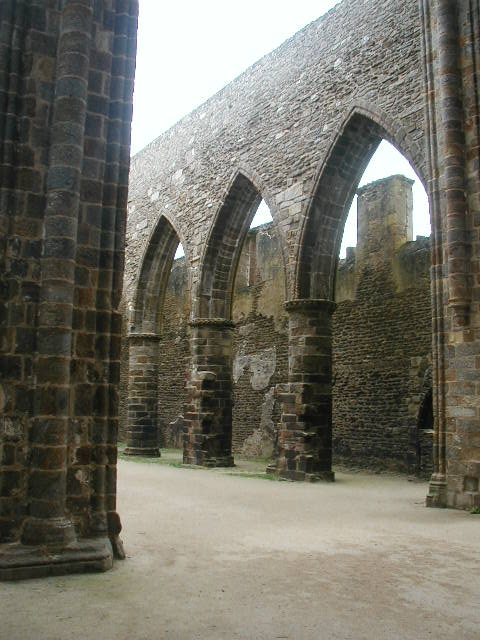 Vestige d'un bâtiment religieux sur la Pointe Saint Mathieu à Plougonvelin